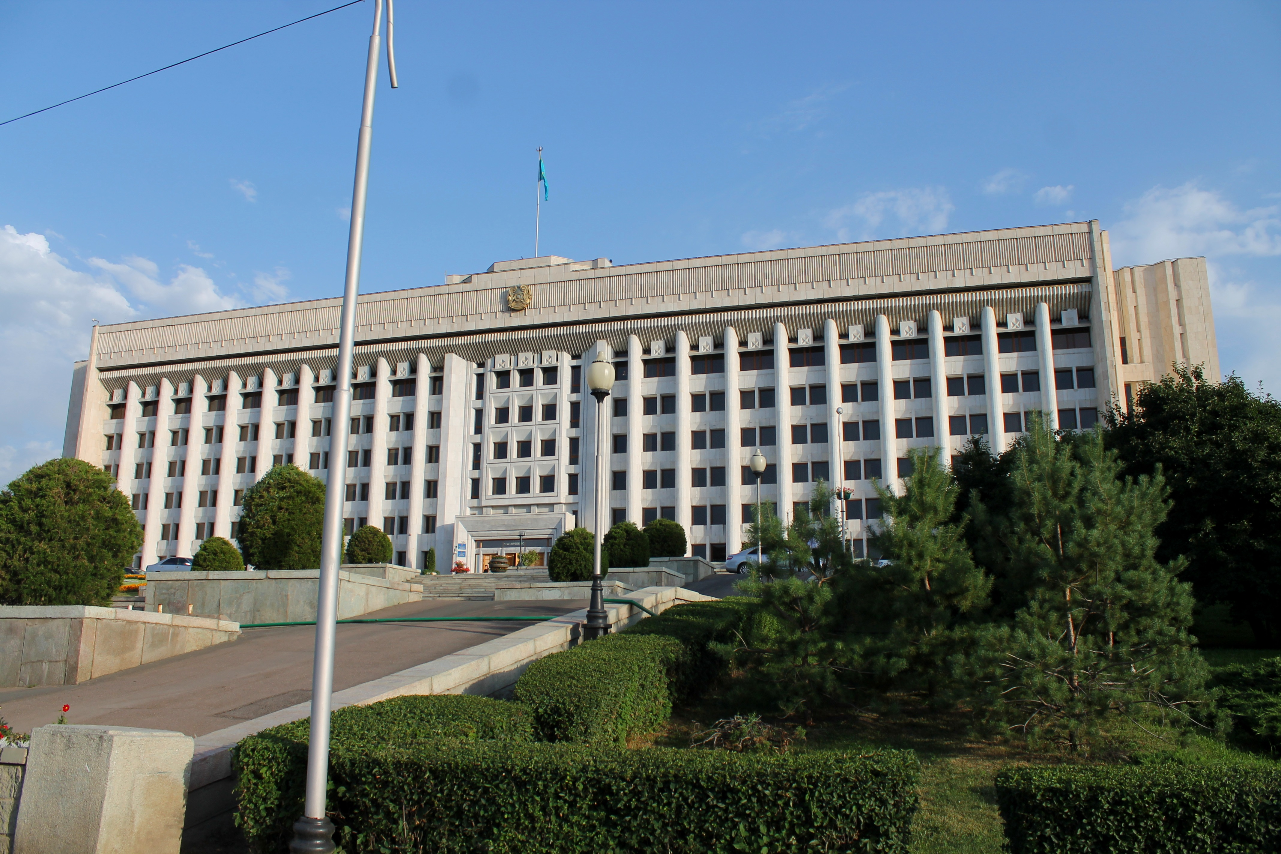 Мэрия города Алматы.